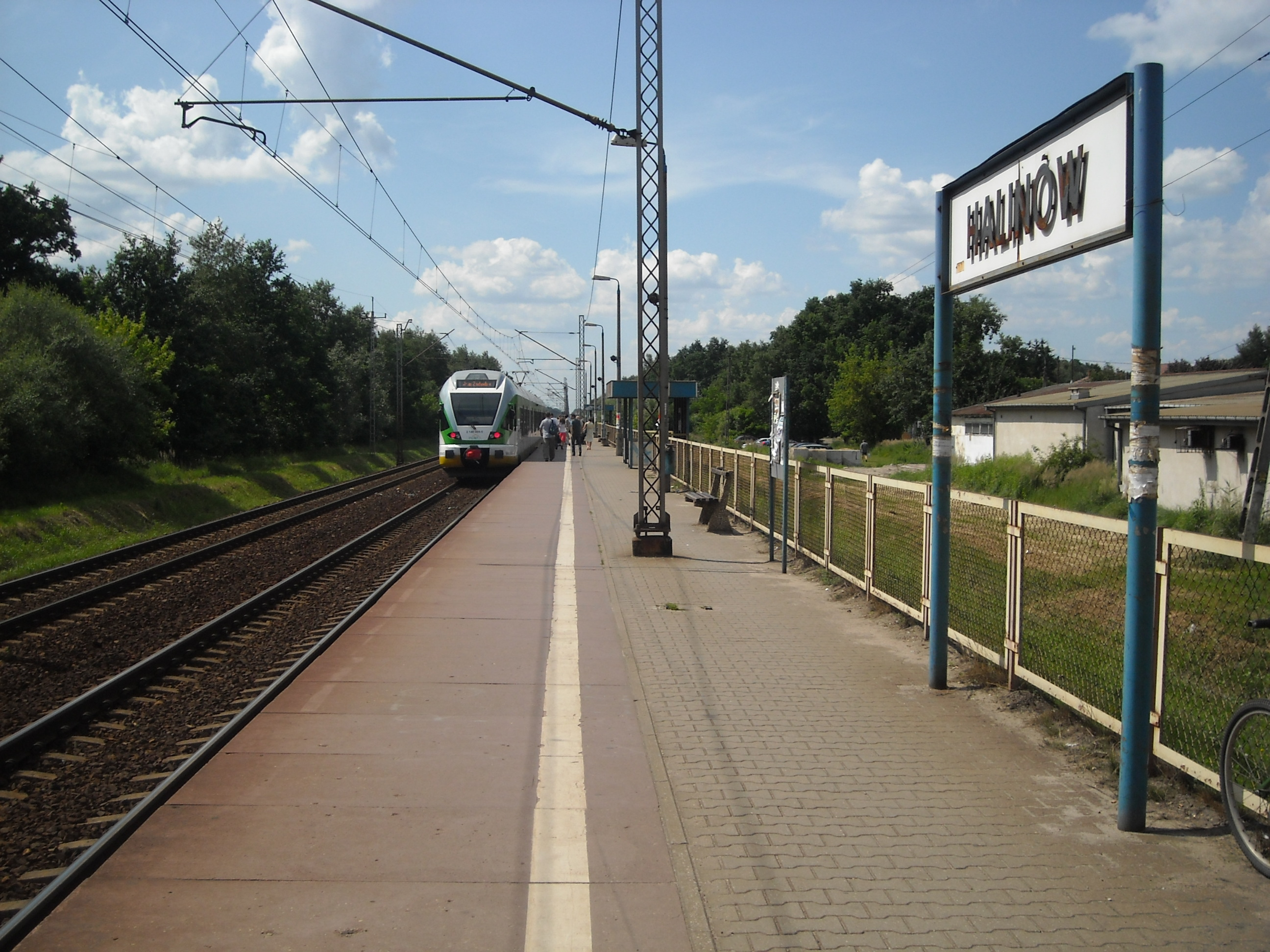 Przystanek osobowy Halinów. Widok na peron drugi.